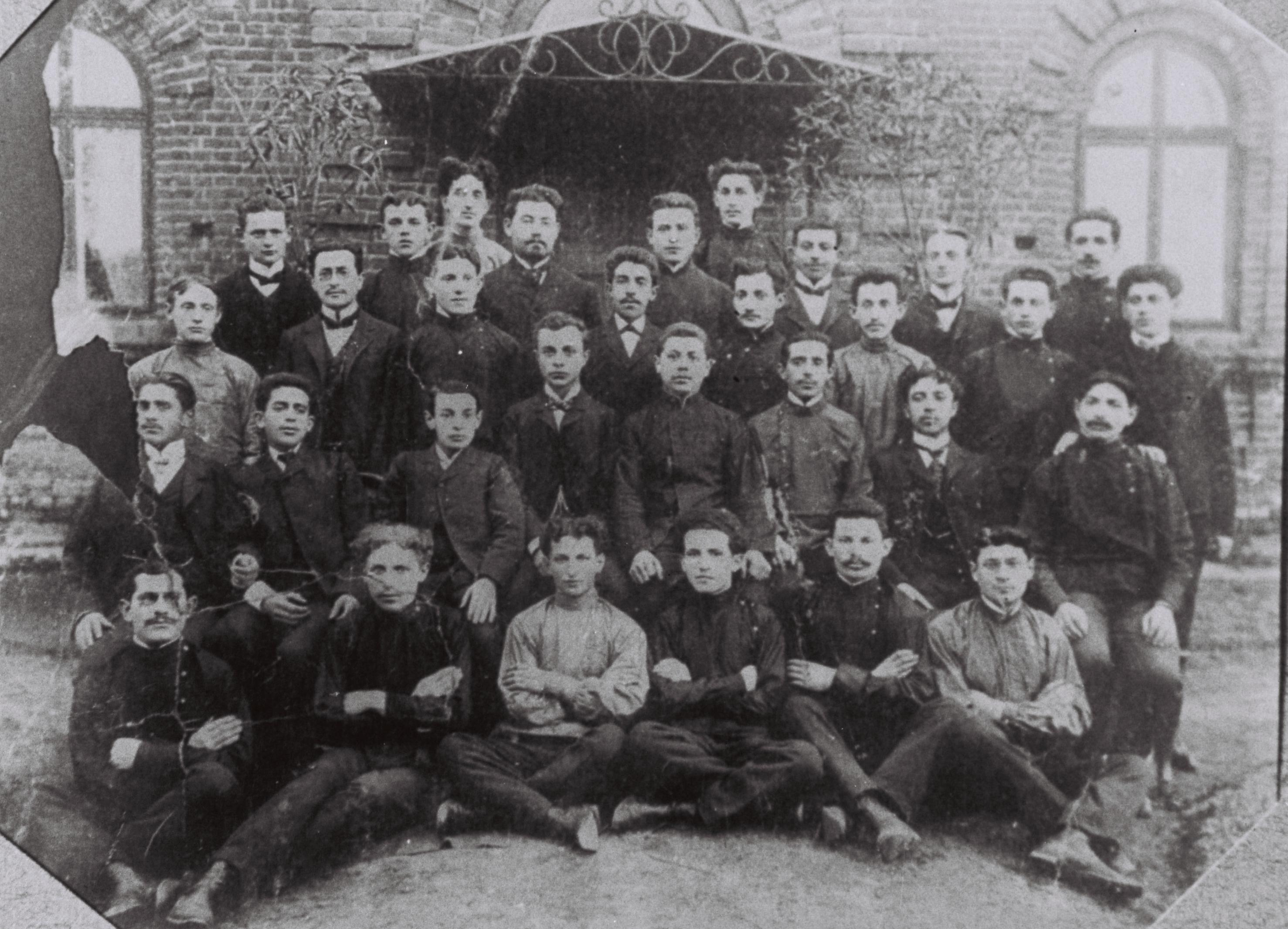 DAVID GREEN (BEN GURION) 3RD FRONT, (R) AT POALEI ZION GROUP "EZRA" IN PLONSK. GPO: 01/10/1905.